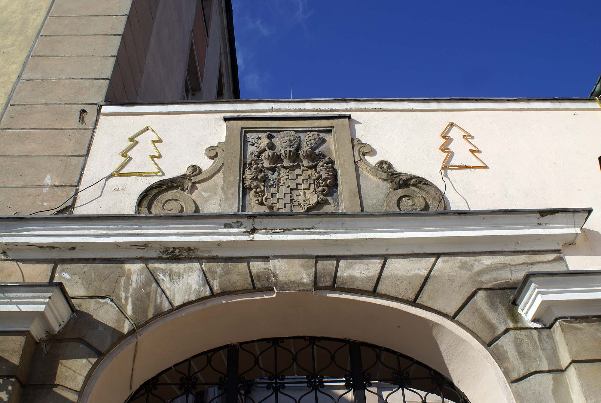 Wołów, pl. Piastowski 2 - zamek, ob. Starostwo Powiatowe, XVII, XX